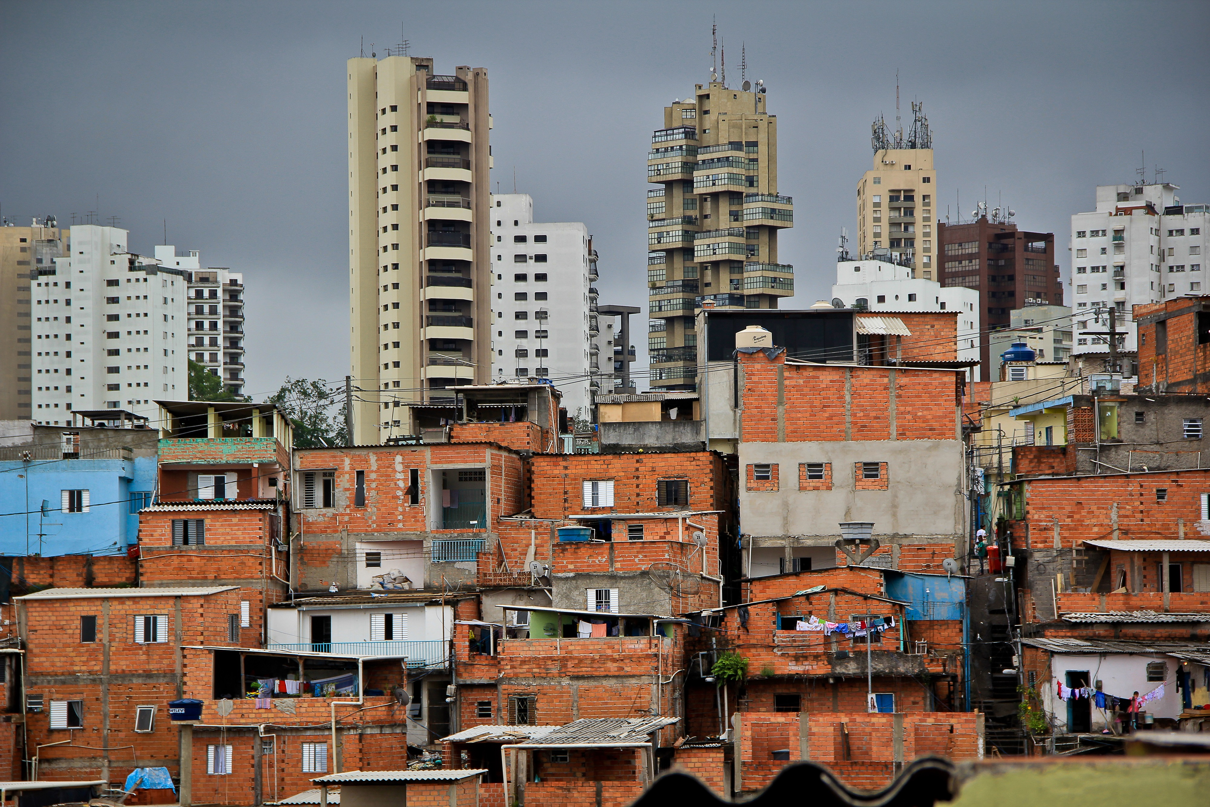 Contrastes da cidade informal.